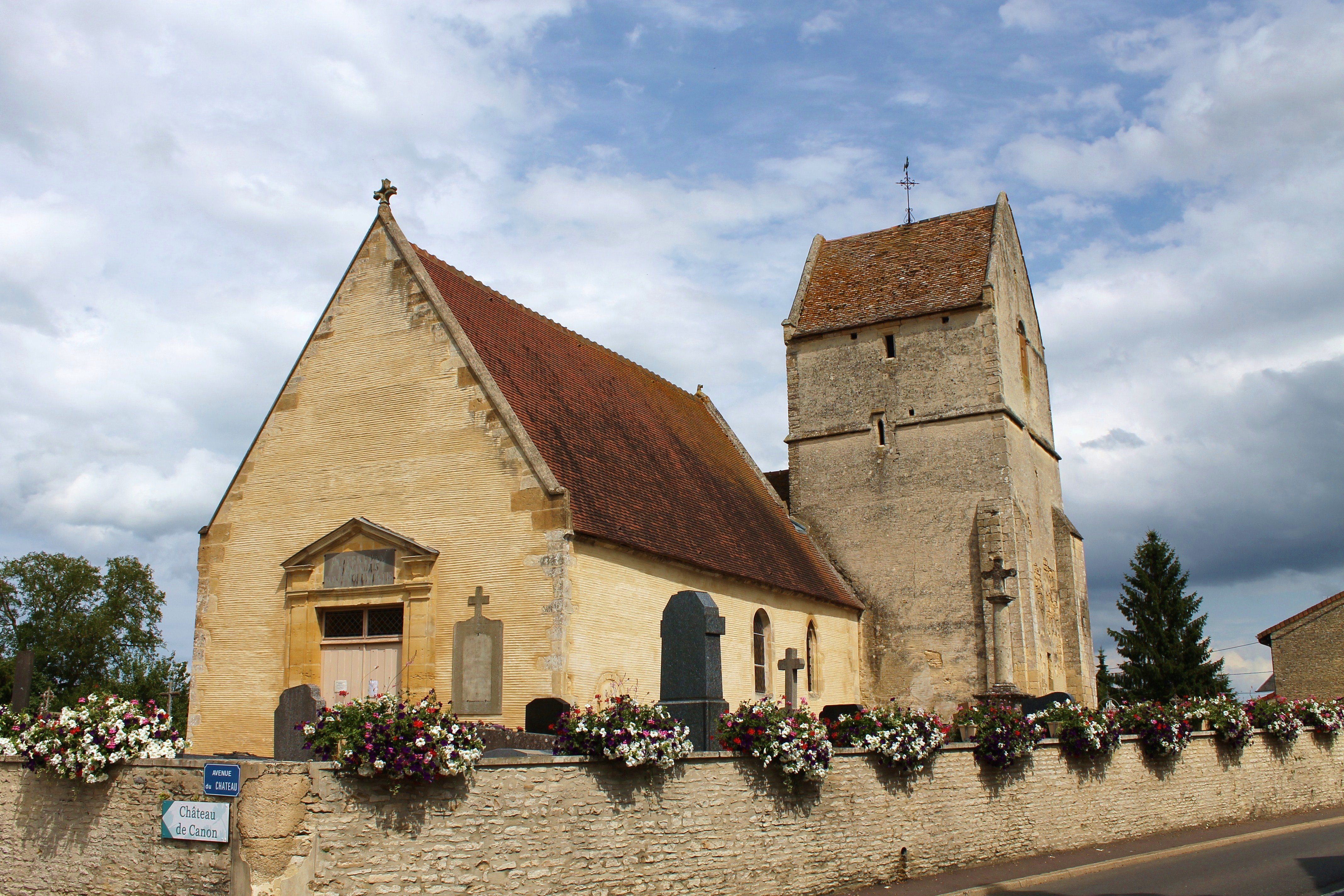 Église de Canon à Mézidon-Canon (Calvados)